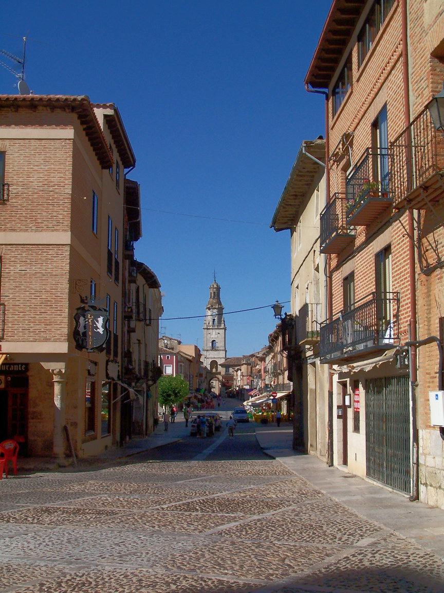 Es una calle de Toro, la calle Mayor, se pasa por debajo del arco que se ve al fondo. La foto lleva un cierto tratamiento de brillo/contraste, para aclarar las zonas más oscuras, esto le da un toque un tanto antinatural, pero mejora su visualización. Fue realizado con GIMP. Os recomiendo que visiteis toro, está muy bien, y muy cerca.